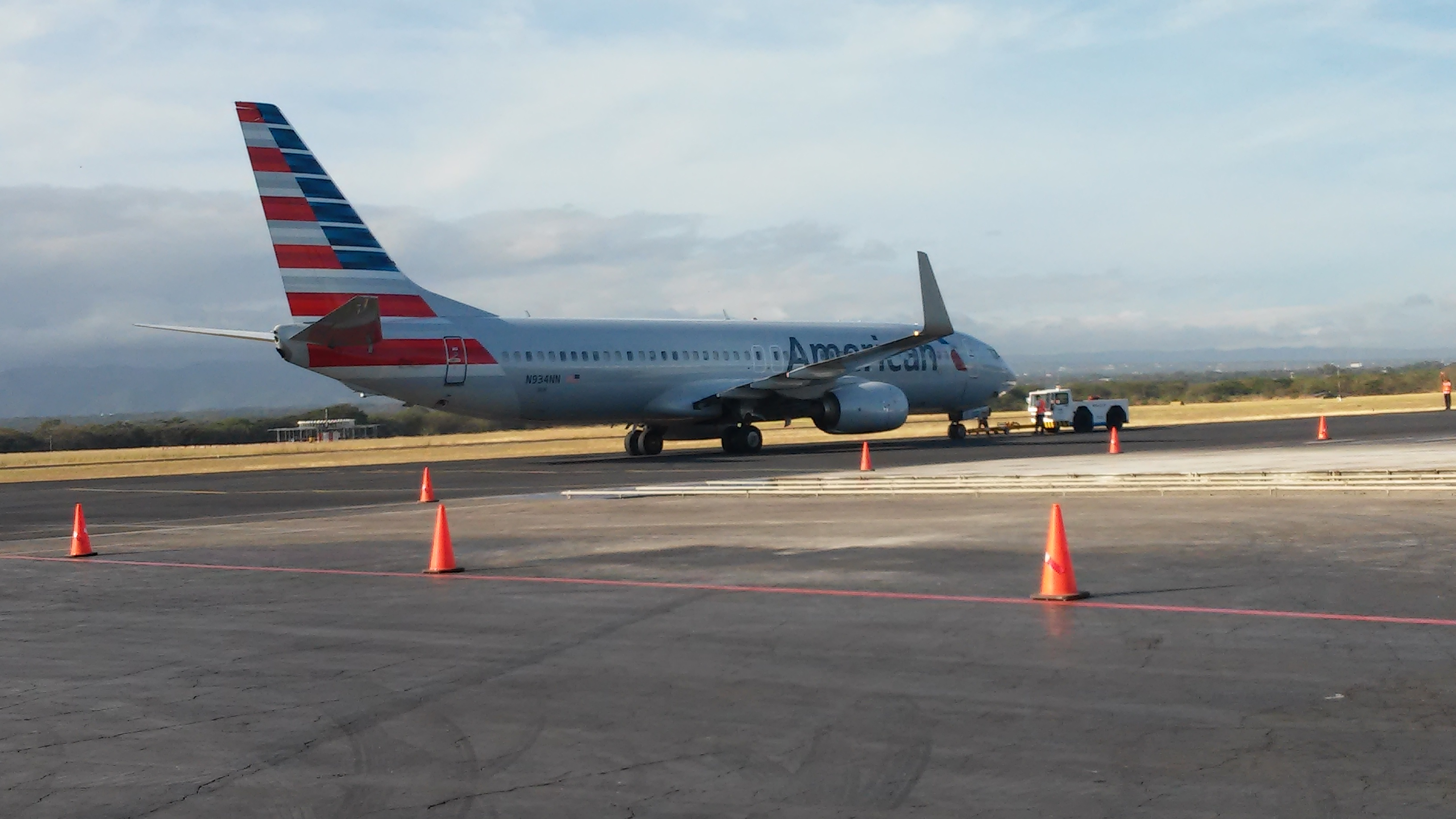 Push Back American Airlines Managua Nicaragua